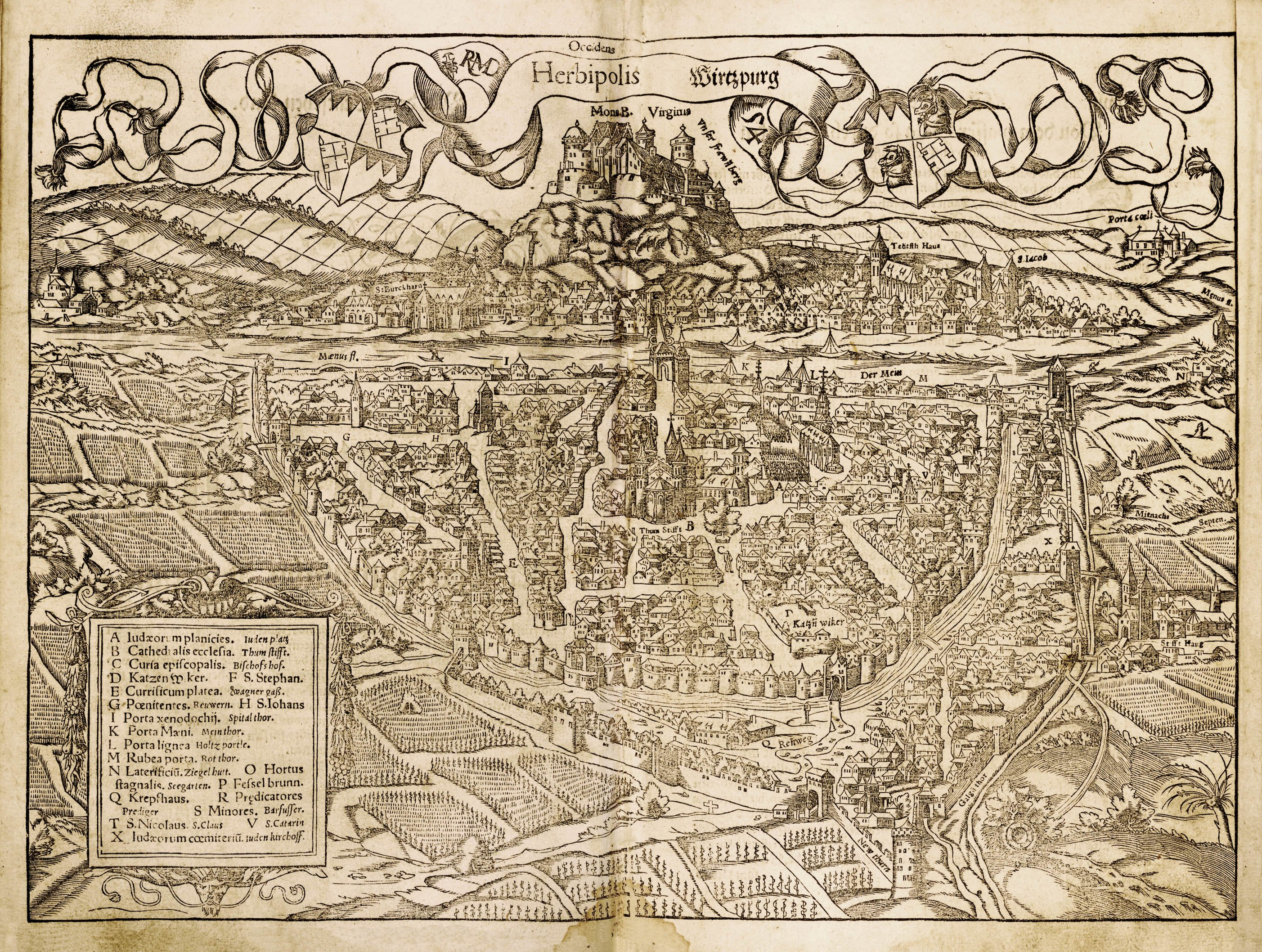 Würzburg ca. 1550 by Sebastian Münster